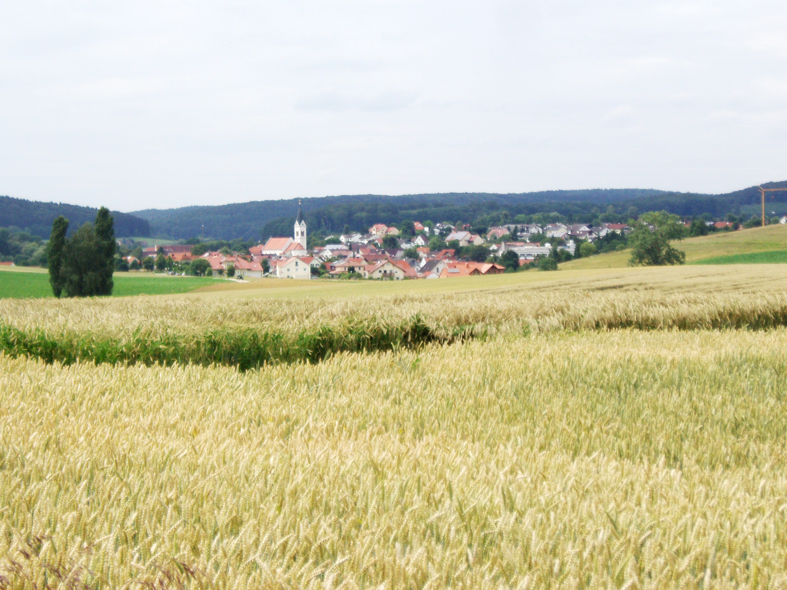 Oberdolling_im_Landkreis_Eichstätt,_Ortsansicht